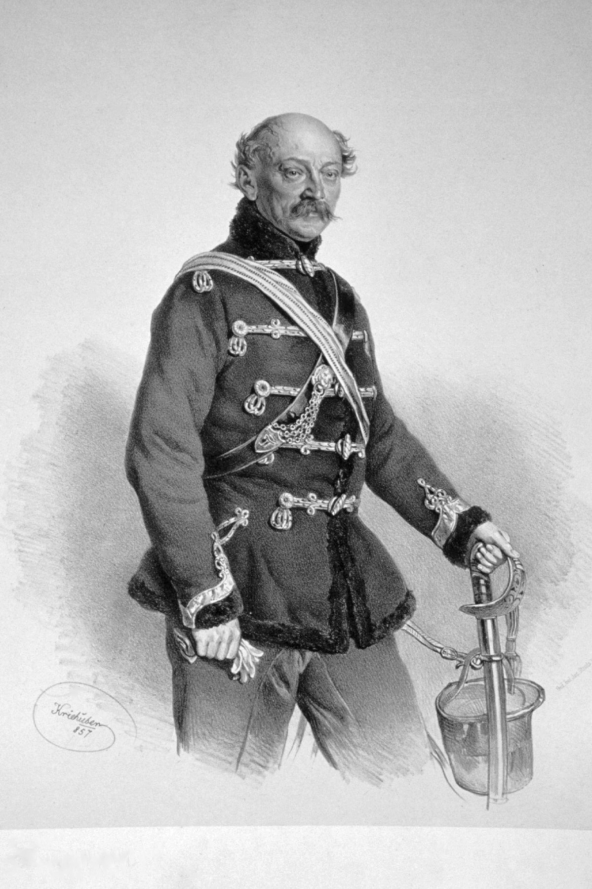 Wilhelm Graf Hompesch zu Bolheim (1800-1861),k. k. Oberst, Lithographie von Josef Kriehuber, 1857